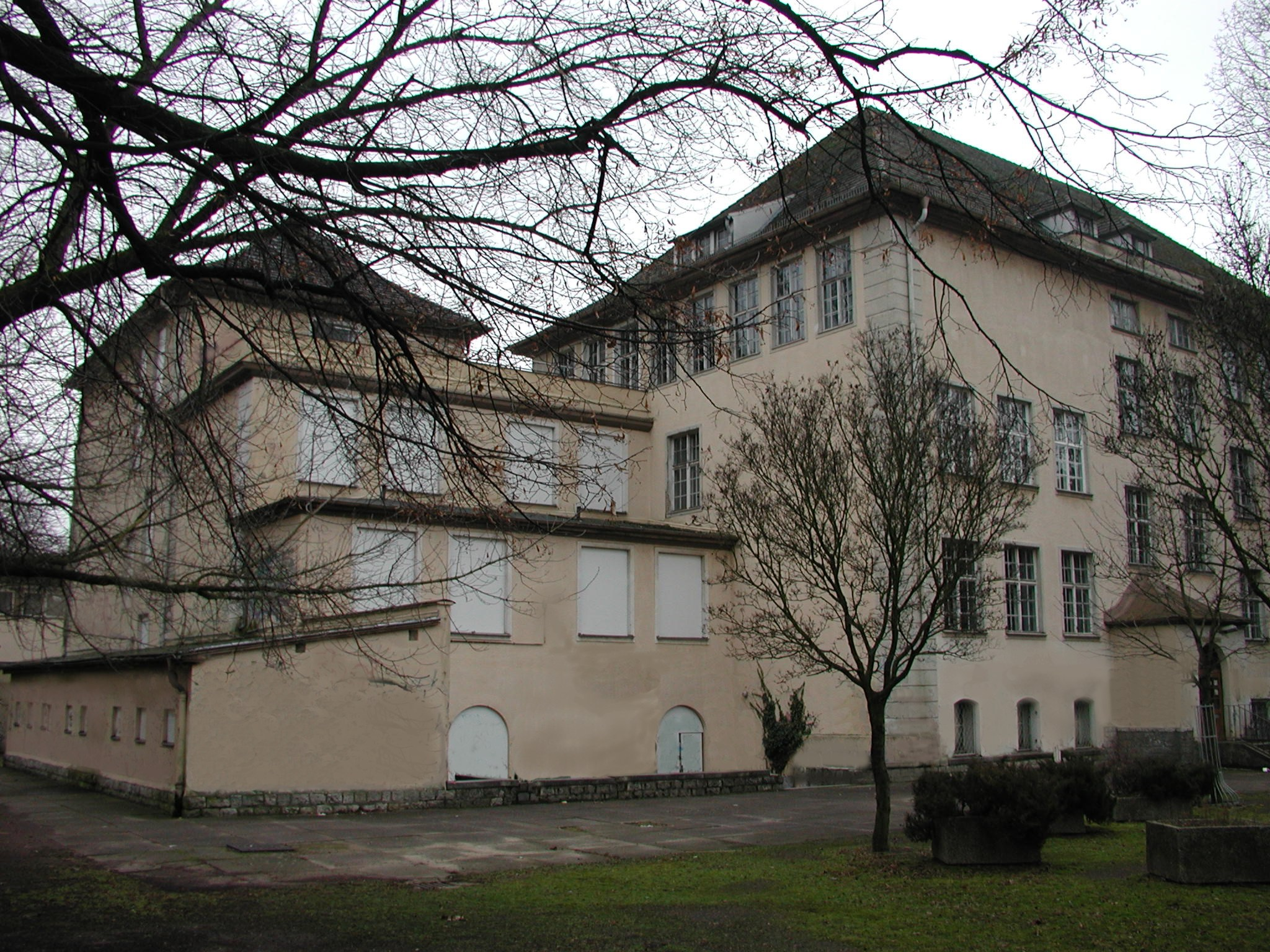 Gebäude der geschlossenen 15. Grundschule am Tierpark, Alfred-Kowalke-Str. 29. Abgerissen Mai/Juni 2014.